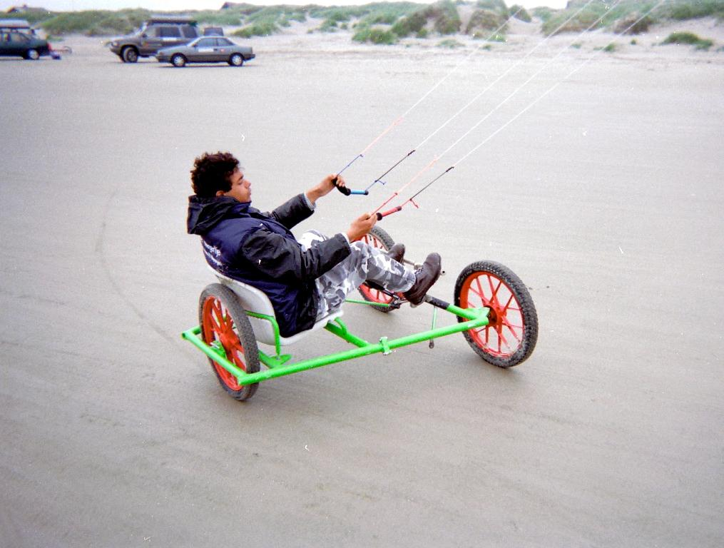 Buggy latéral à Fanø.